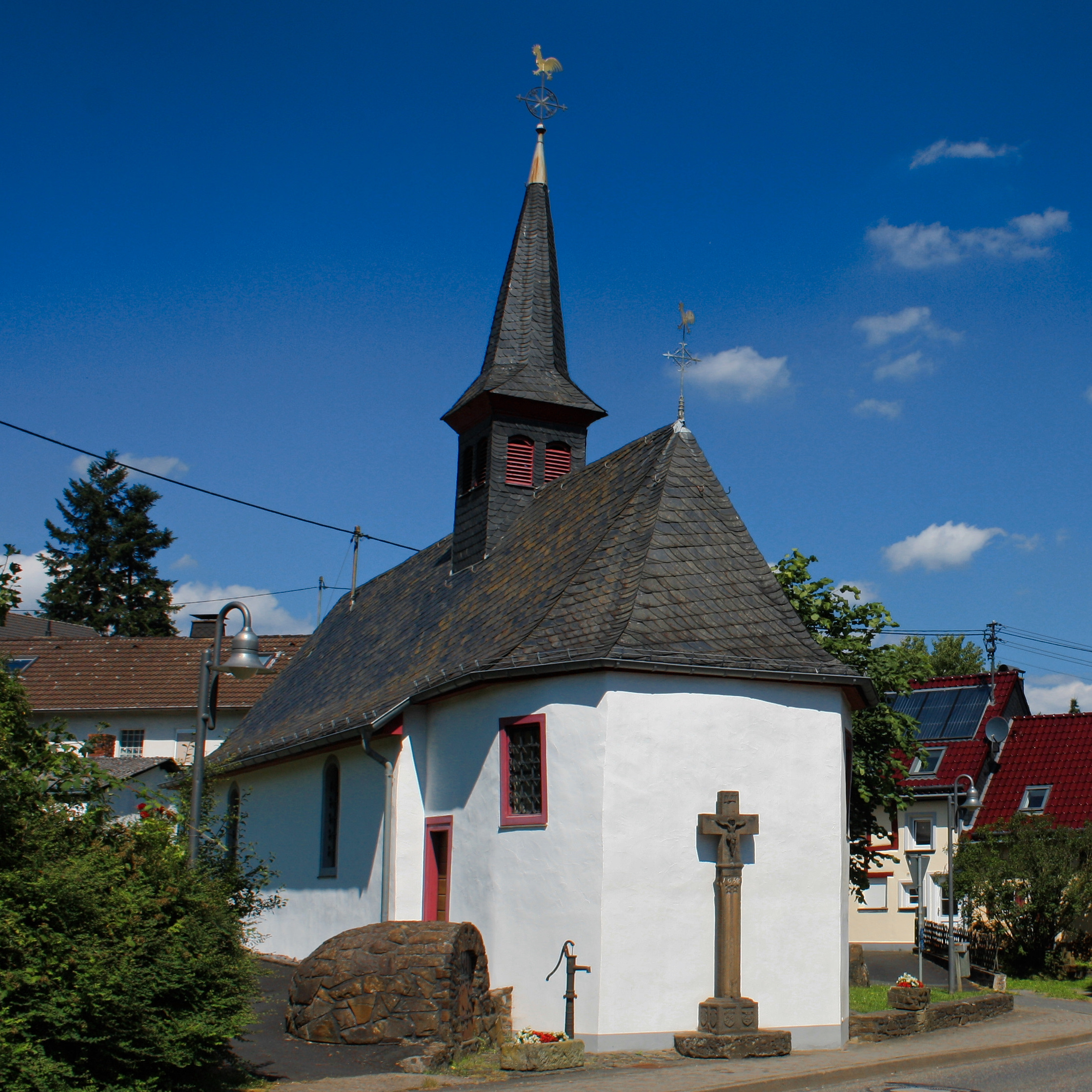 Adenau Breidscheid, St. Rochus und St. Sebastian